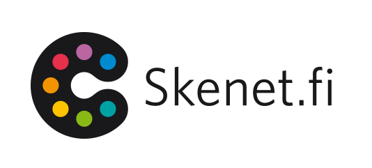 Helsingin kulttuurikeskuksen Skenet.fi-verkkolehden tunnus